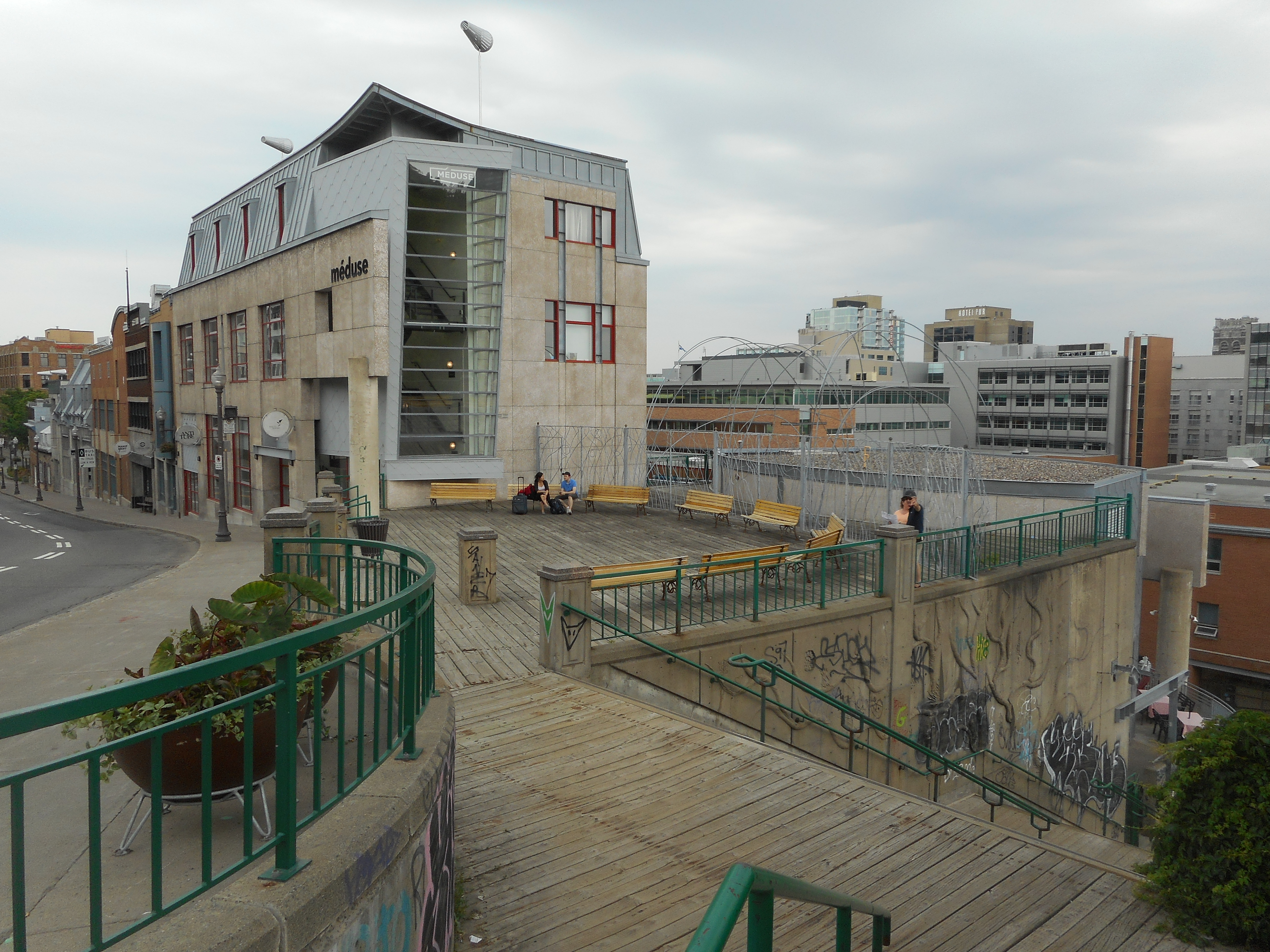 Coopérative Méduse, côte d'Abraham, Québec